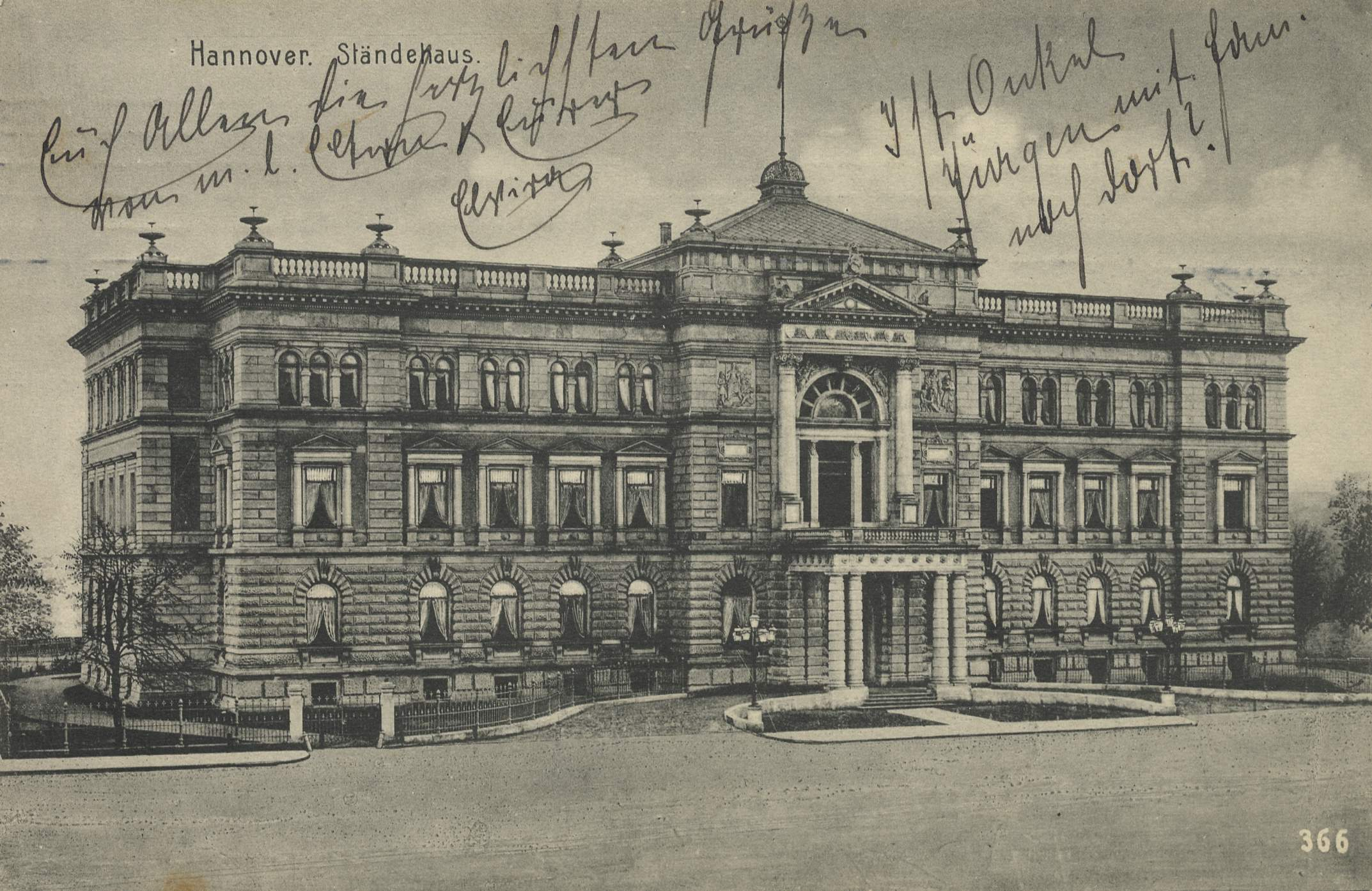 Das ehemalige Provinzial-Ständehaus am Schiffgraben in Hannover ...